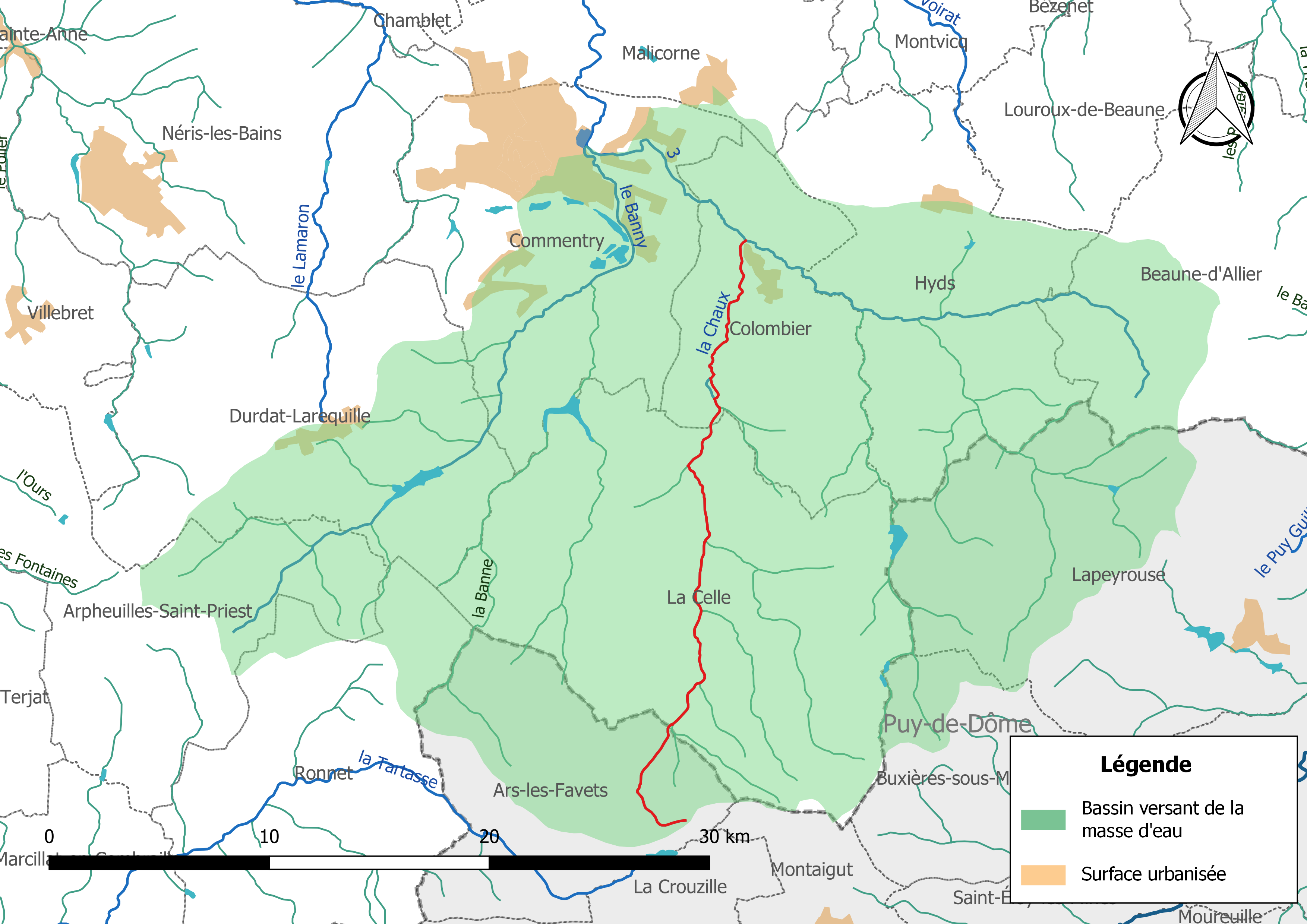 Carte du cours d'eau « la Chaux » (France) et de la zone hydrographique dans laquelle il s'insère.